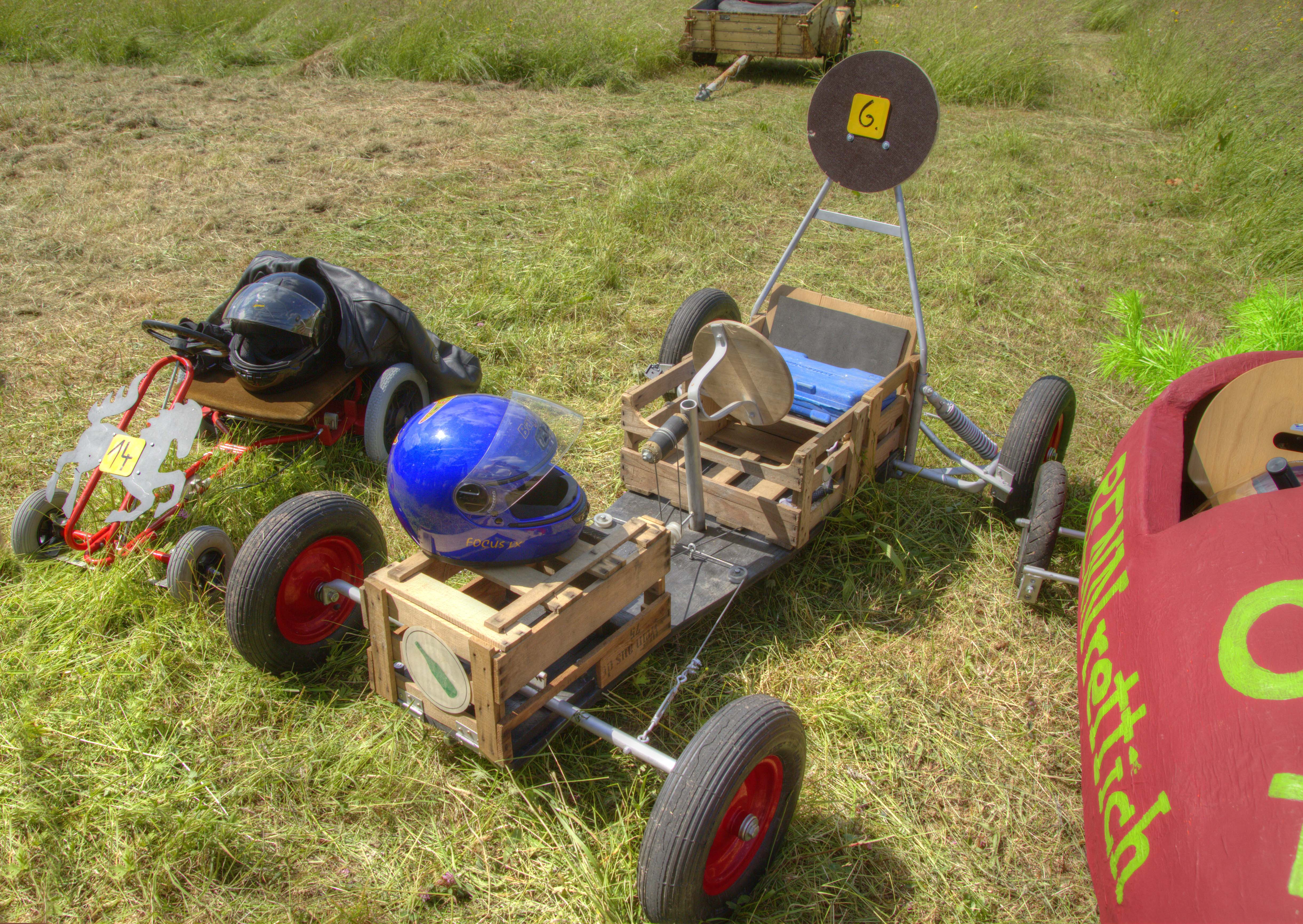 Eine Seifenkiste beim Völkersbacher Brunnenfest, einem Teilort von Malsch.